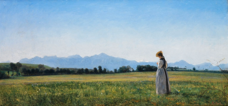 Junges Mädchen in Tracht in sommerlicher Voralpenlandschaft, Öl auf Leinwand. 46 x 94 cm.